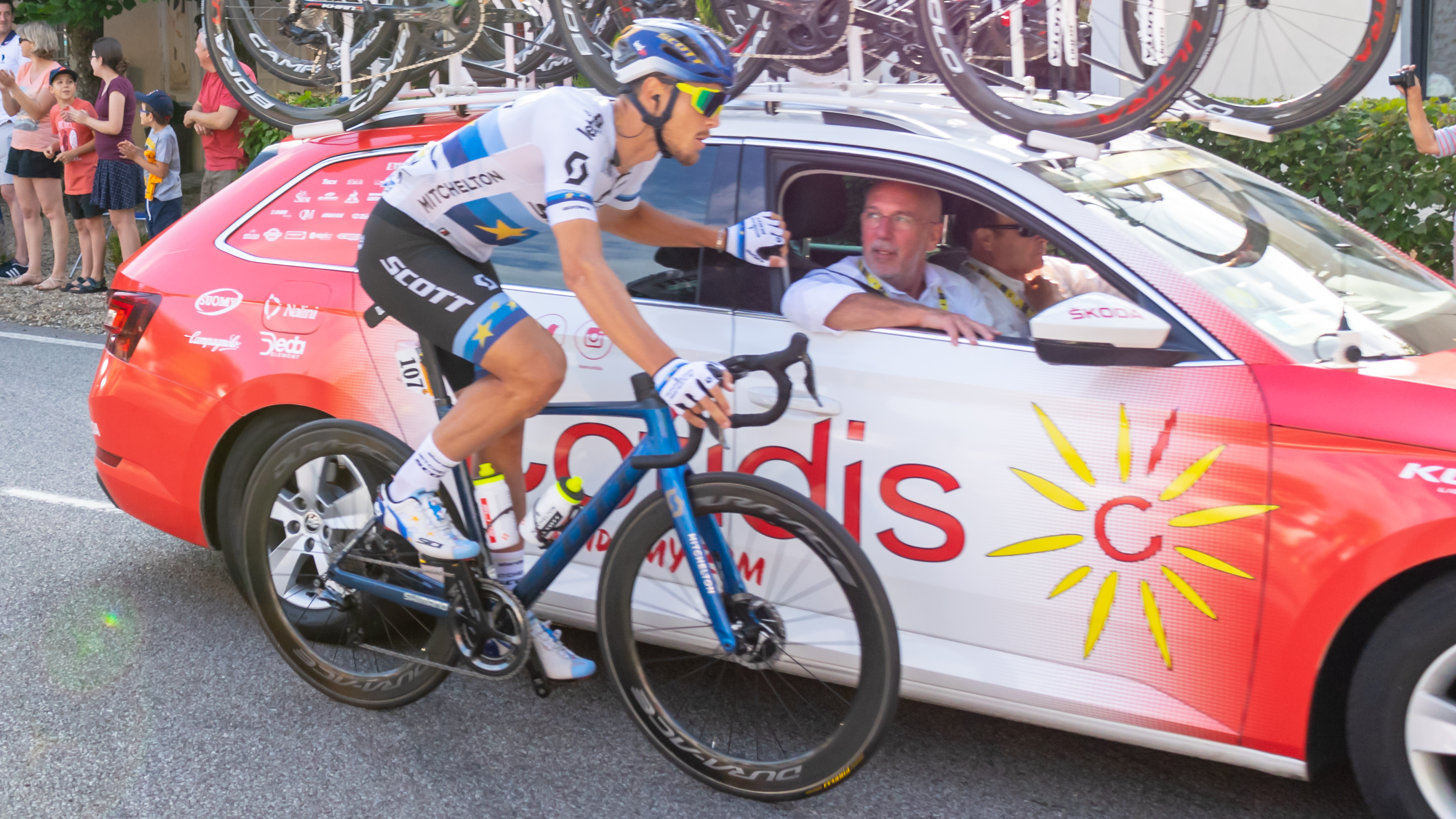 107. Matteo Trentin (ITA) - 2